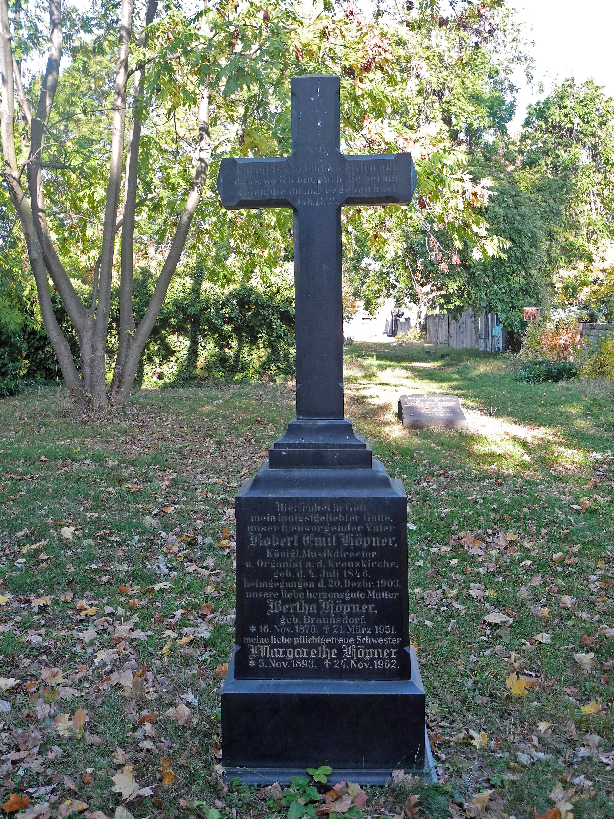 Alter Annenfriedhof in Dresden-Südvorstadt, Grabstätte des Kgl. Musikdirektors und Organisten an der Kreuzkirche Robert Emil Höpner (4. Juli 1846 – 20. Dezember 1903)